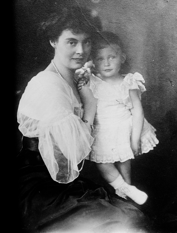 Kronprinzessin Cecilie mit ihrem jüngsten Sohn (*1911).Reproduction Number: LC-DIG-ggbain-14757